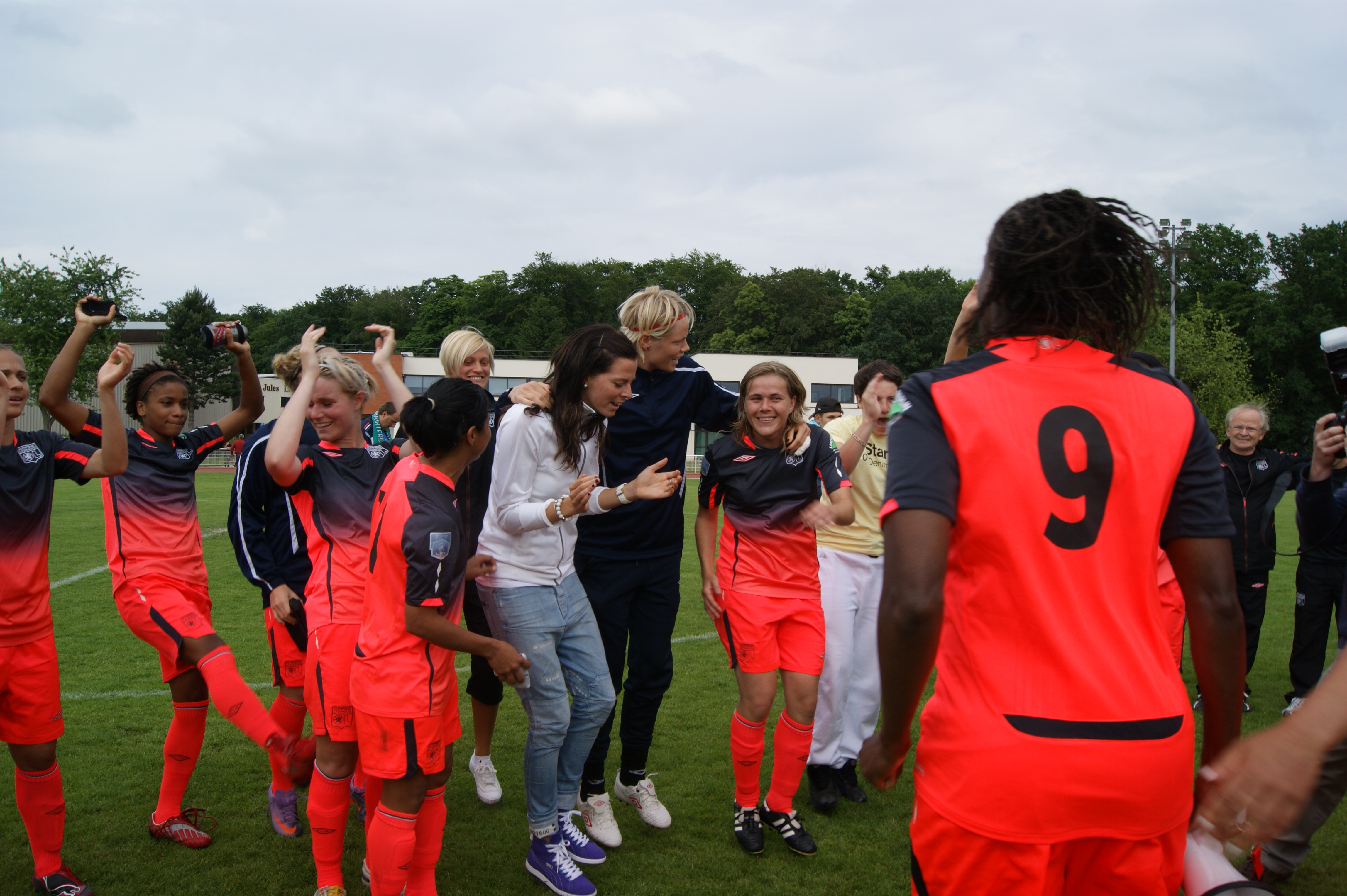 Les joueuses de l'Olympique lyonnais fêtent le titre de championne de France 2009-2010 après leur victoire contre l'AS Montigny-le-Bretonneux lors de la dernière journée du championnat de France de football féminin 2009-2010.